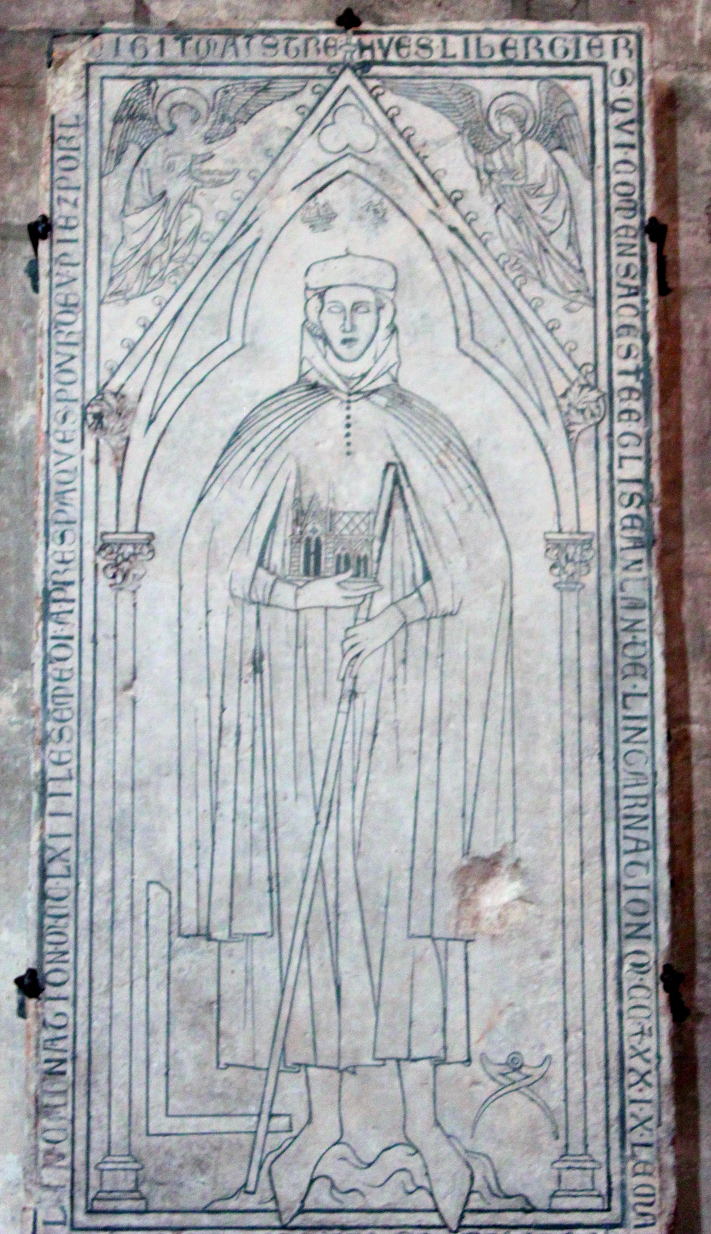 Plaque tombale de Hugues Libergier, transférée dans la cathédrale Notre-Dame de Reims (France).